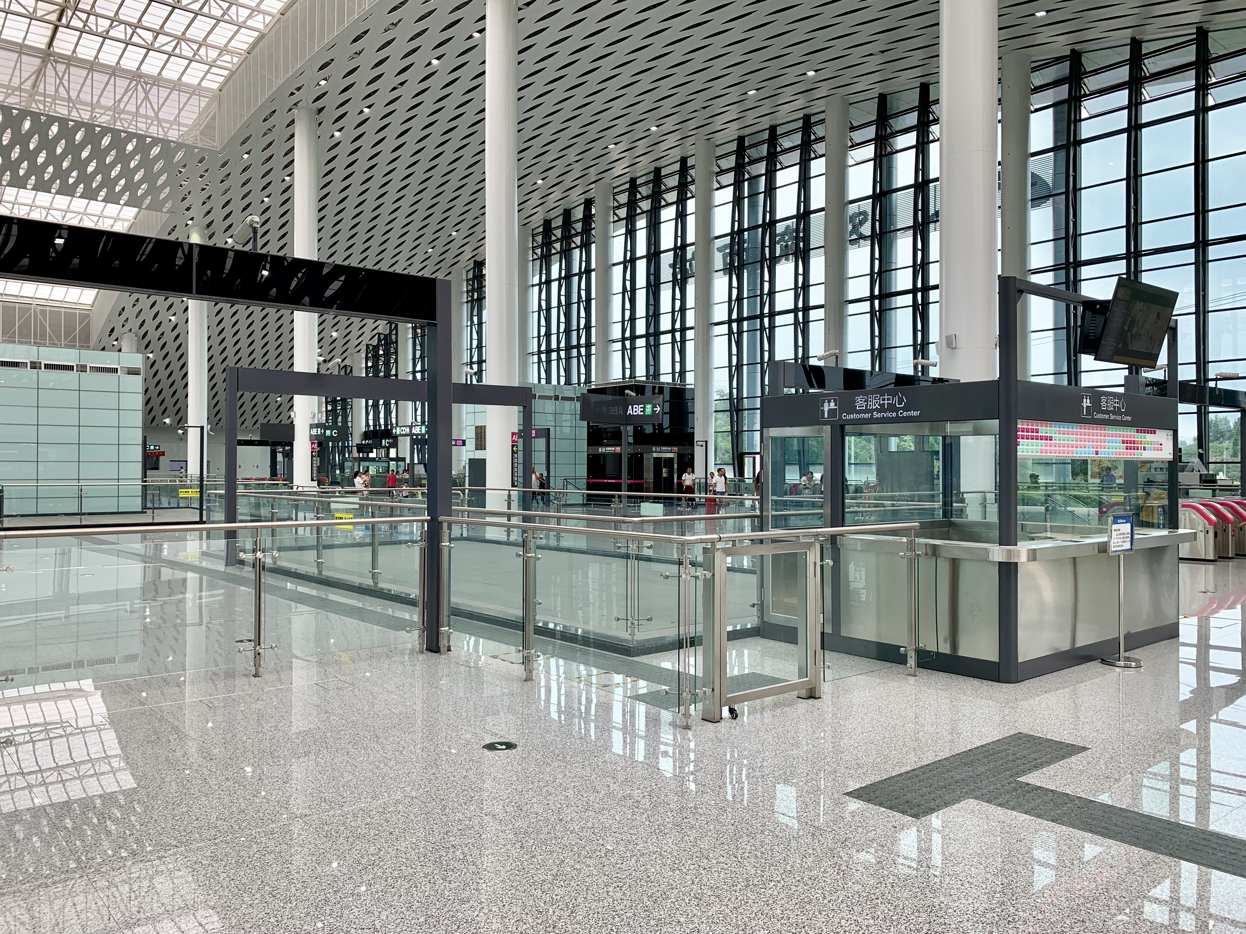 成都地铁双流西站站